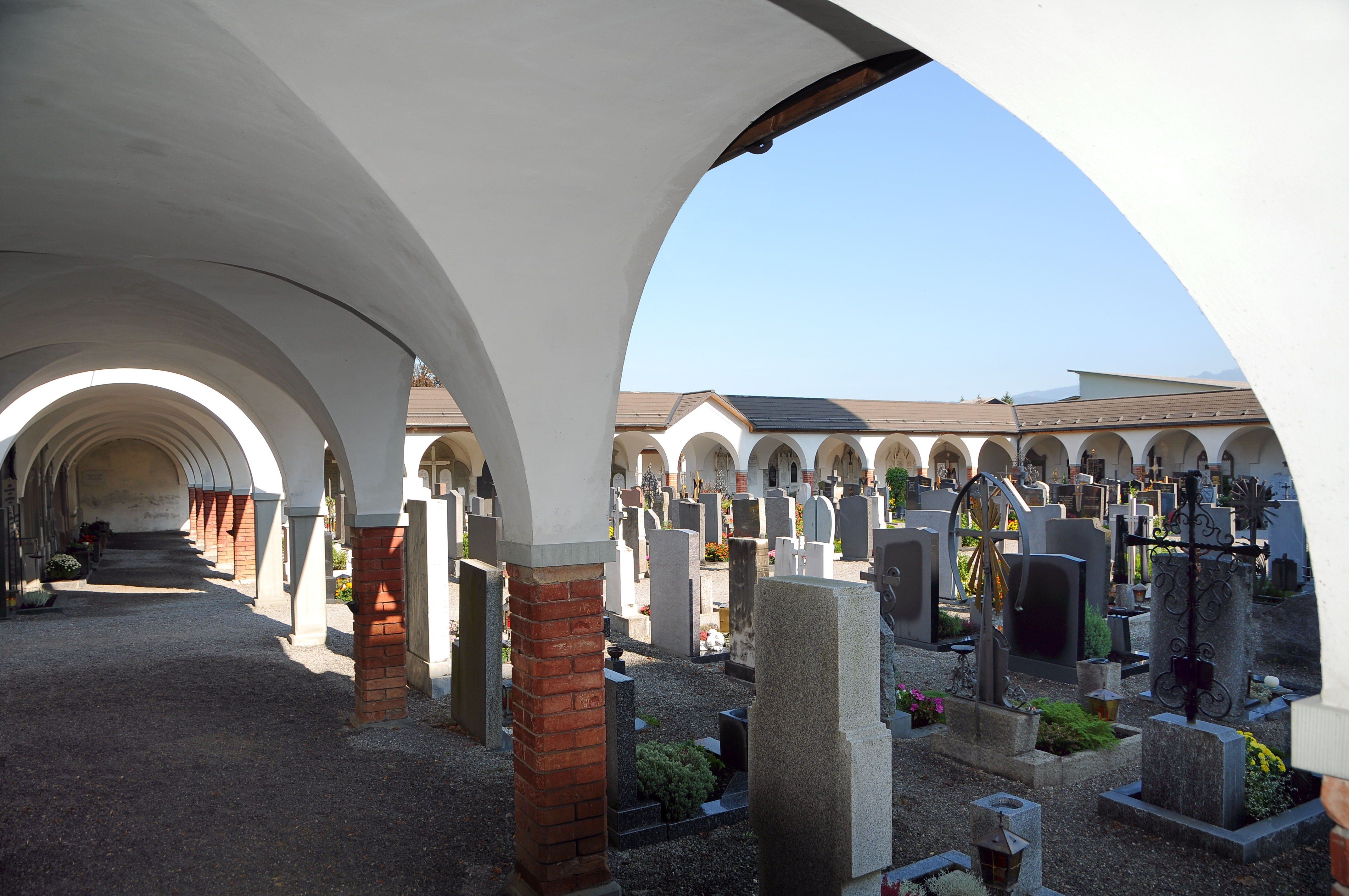 Friedhof christlich bei der Pfarrkirche in Andelsbuch.